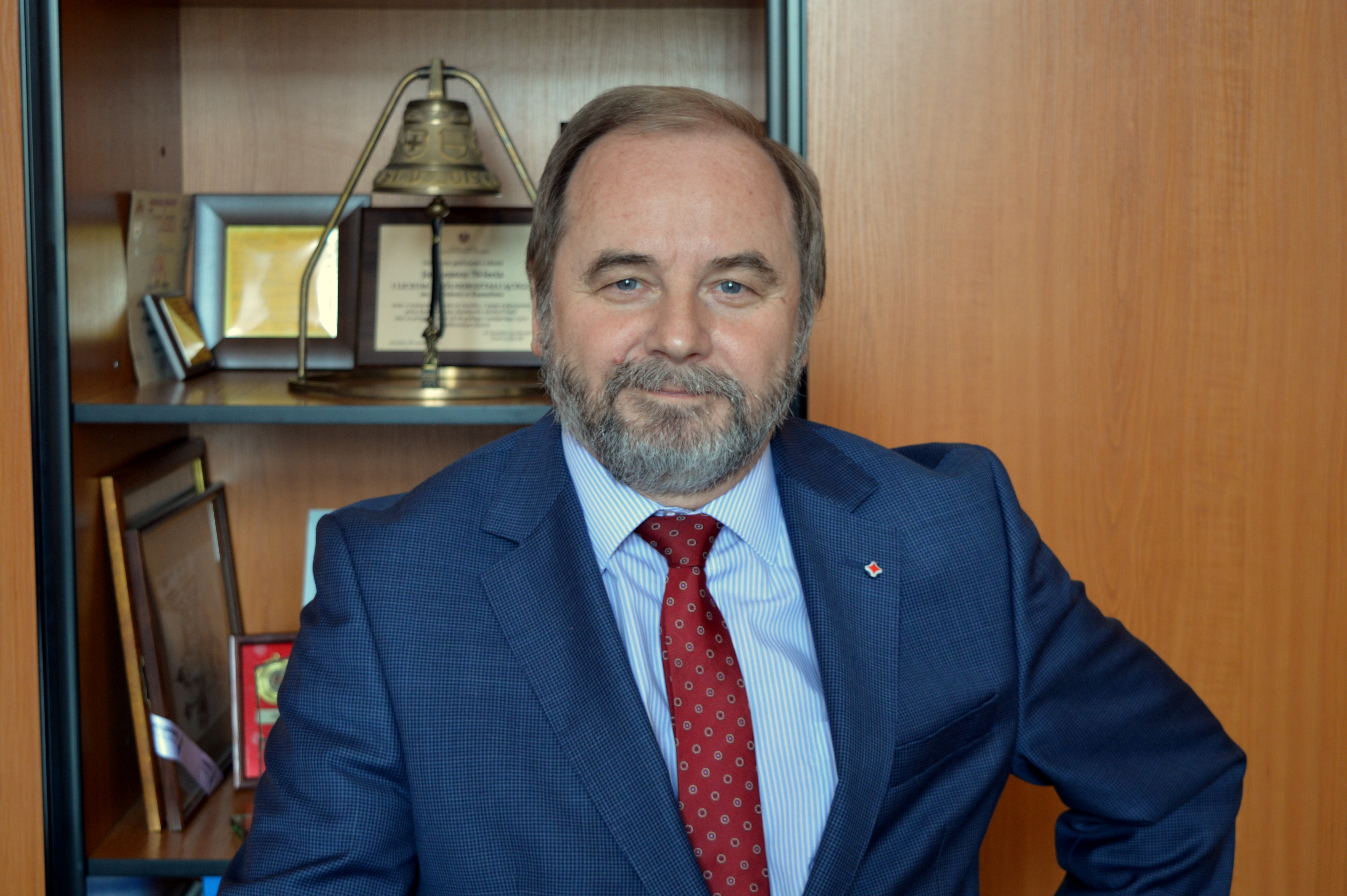 Obecny dyrektor I Liceum Ogólnokształcącego im. Stanisława Dubois w Koszalinie - Rafał Janus